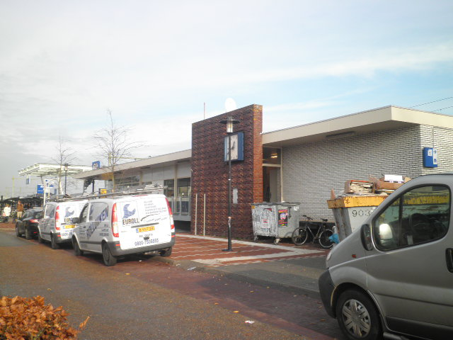 NS Station Schagen.